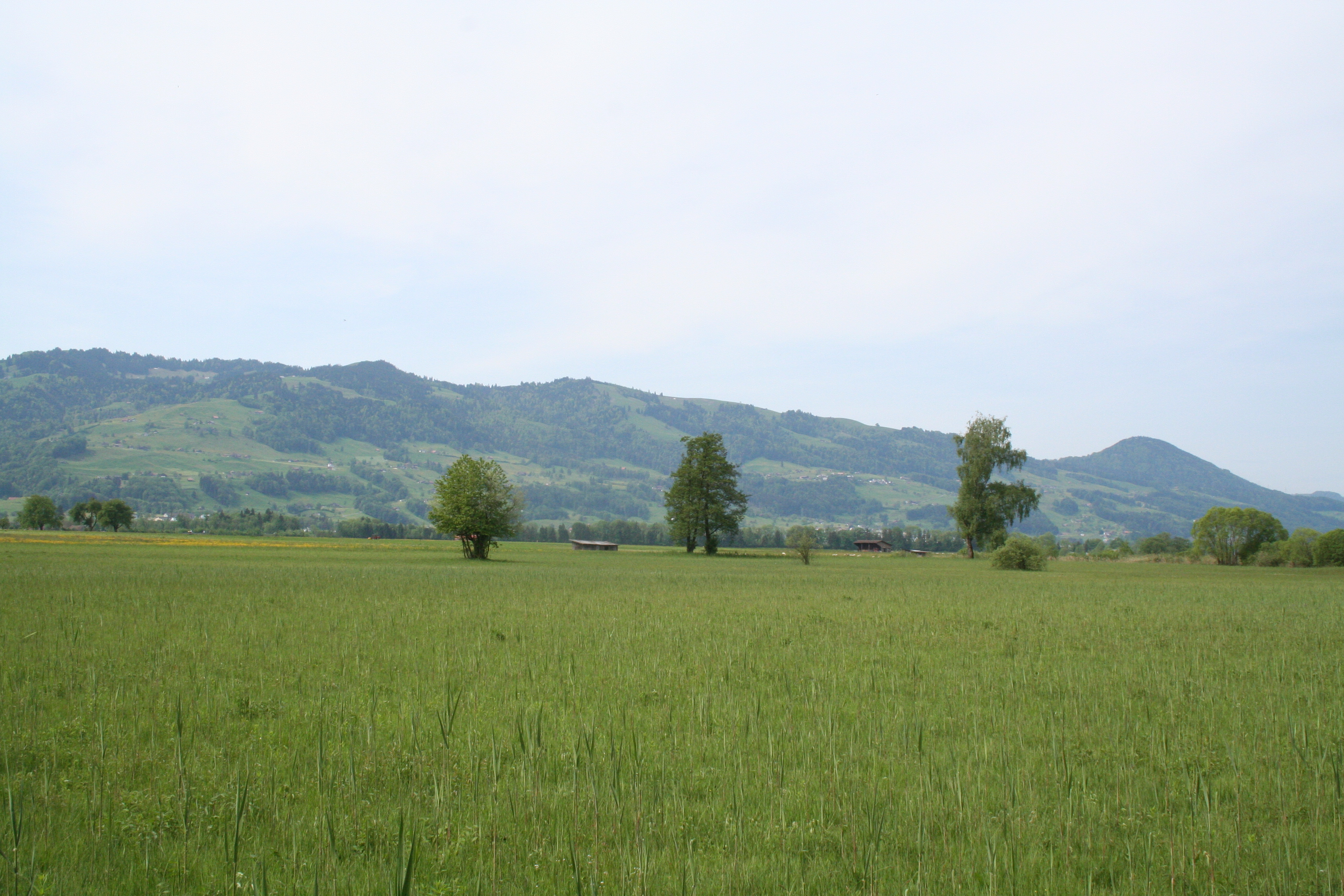 Naturschutzgebiet Ried in Nuolen; rechts im Hintergrund der Etzel